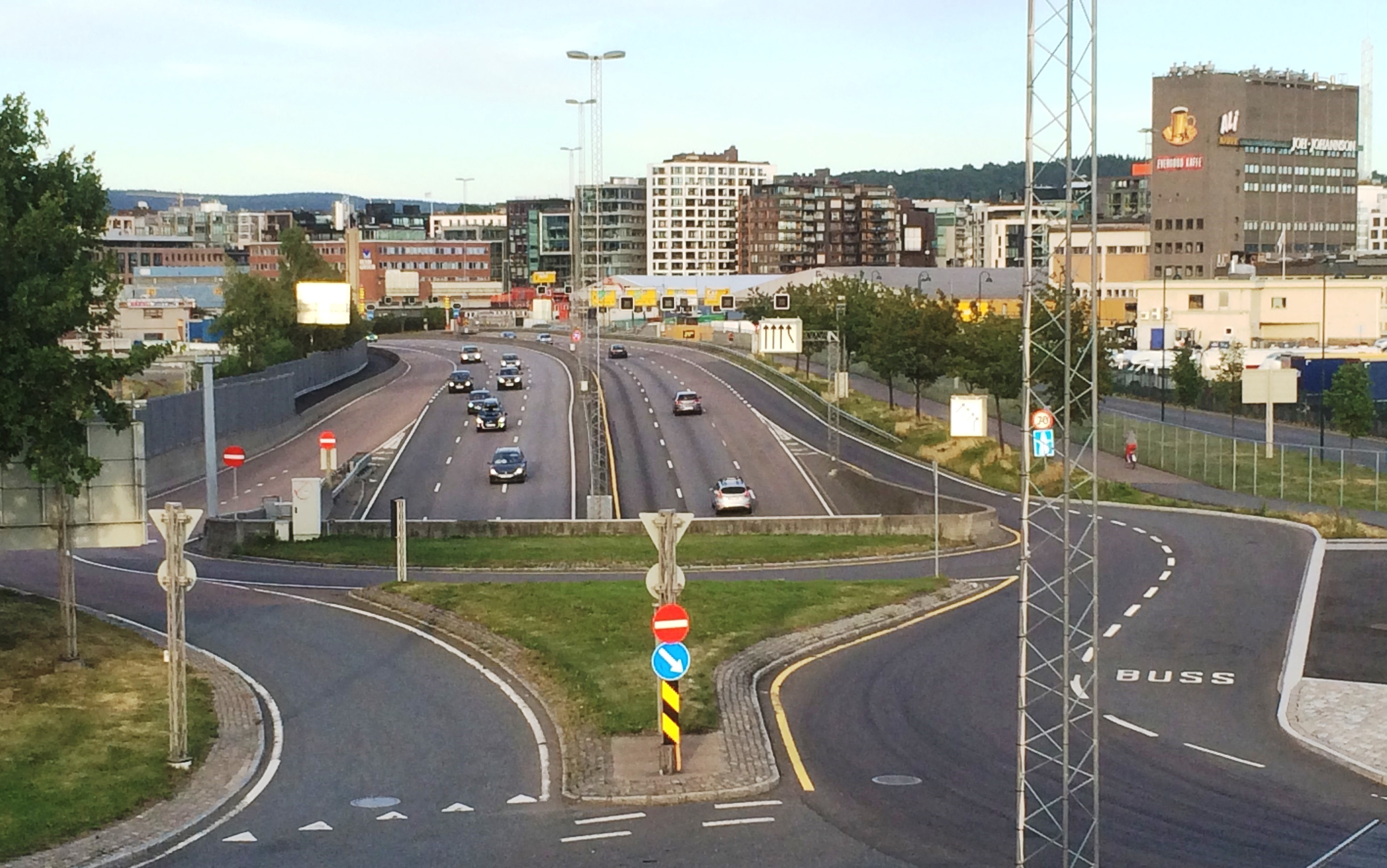 Framneslokket